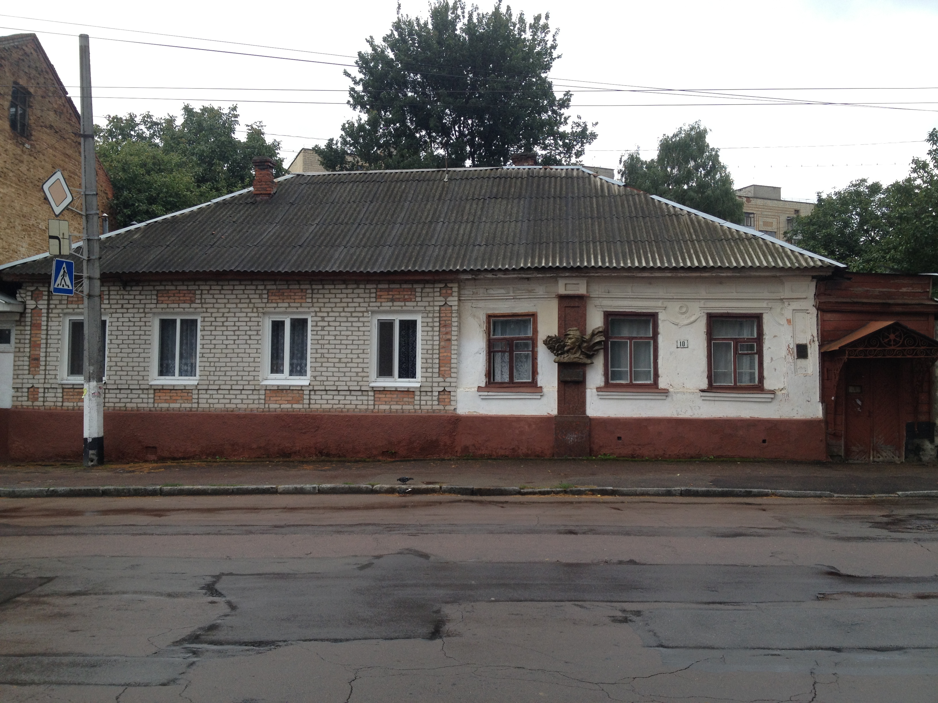 Будинок, в якому народився Ярослав Домбровський, генерал Паризької комуни. , Житомир , Вул. М. Бердичівська, 16